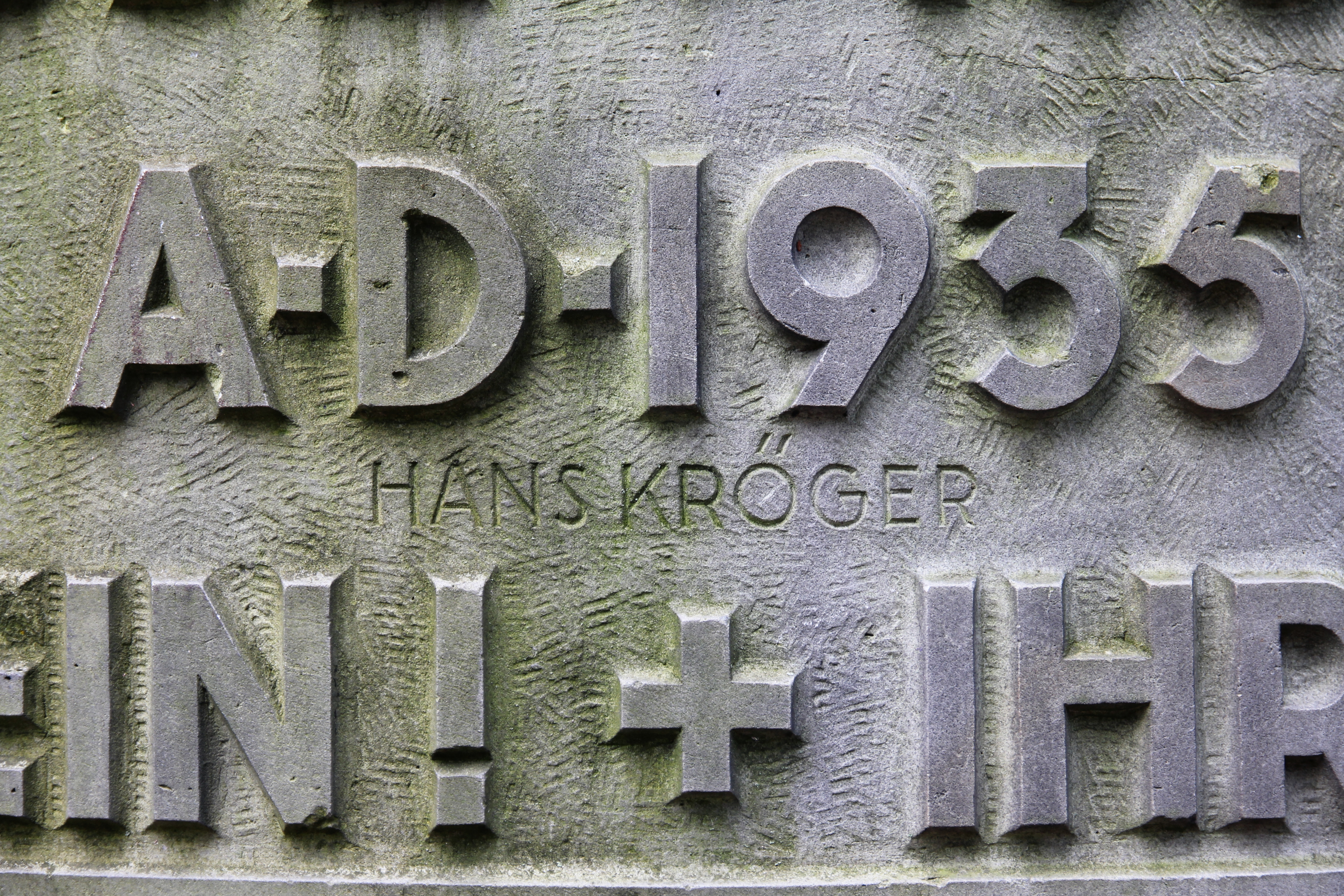 Detail des Kriegerdenkmals im Georgengarten in Hannover für die gefallenen Soldaten des Reserve-Ersatz-Regiments Nr. 4. Inscription/Inschrift: DAS RESERVE-ERSATZ-REGIMENT NR.4 SEINEN 1914-1918 GEFALLENEN HELDEN + --- 1664 OFFIZIERE UND MANNSCHAFTEN DES REGIMENTS BESIEGELTEN IHRE TREUE MIT DEM TODE + A.D.1935 HANS KRÖGER IHR HELDENMUETIGES STERBEN WAR NICHT UMSONST! ES SOLL UNS EIN DAUERNDES VORBILD SEIN! + --- GR-SCHLACHT IN FRANKREICH FLANDERN SOMME AISNE-CHAMPAGNE VERDUN